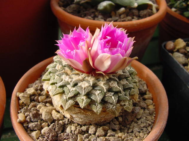 Ein Ariocarpus kotschoubeyanus in der Blüte